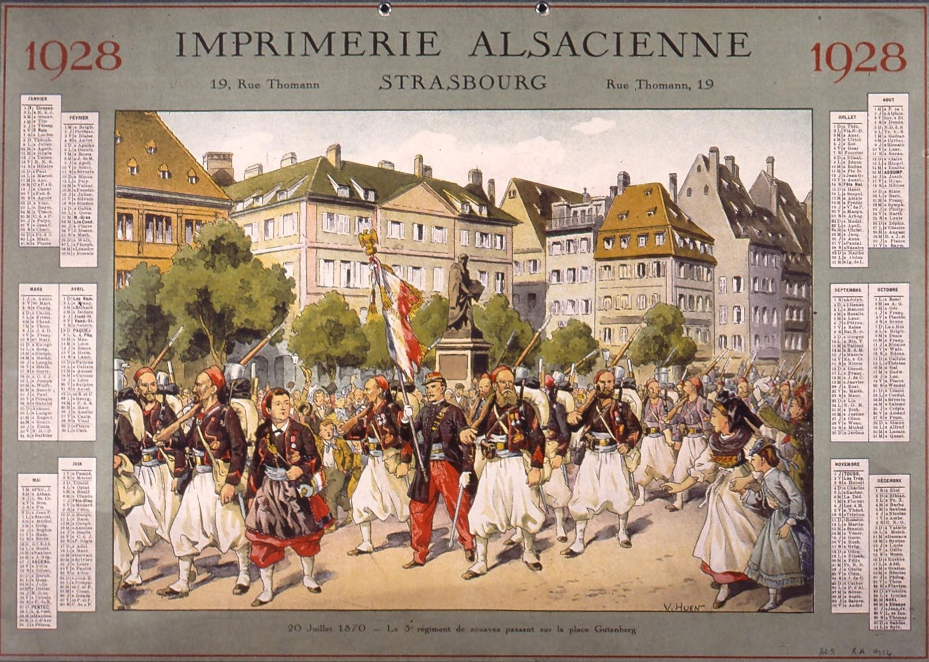 20 Juillet 1870 - Le 3e régiment de Zouaves passant sur la place Gutenberg. 1928. Bibliothèque nationale et universitaire de Strasbourg.